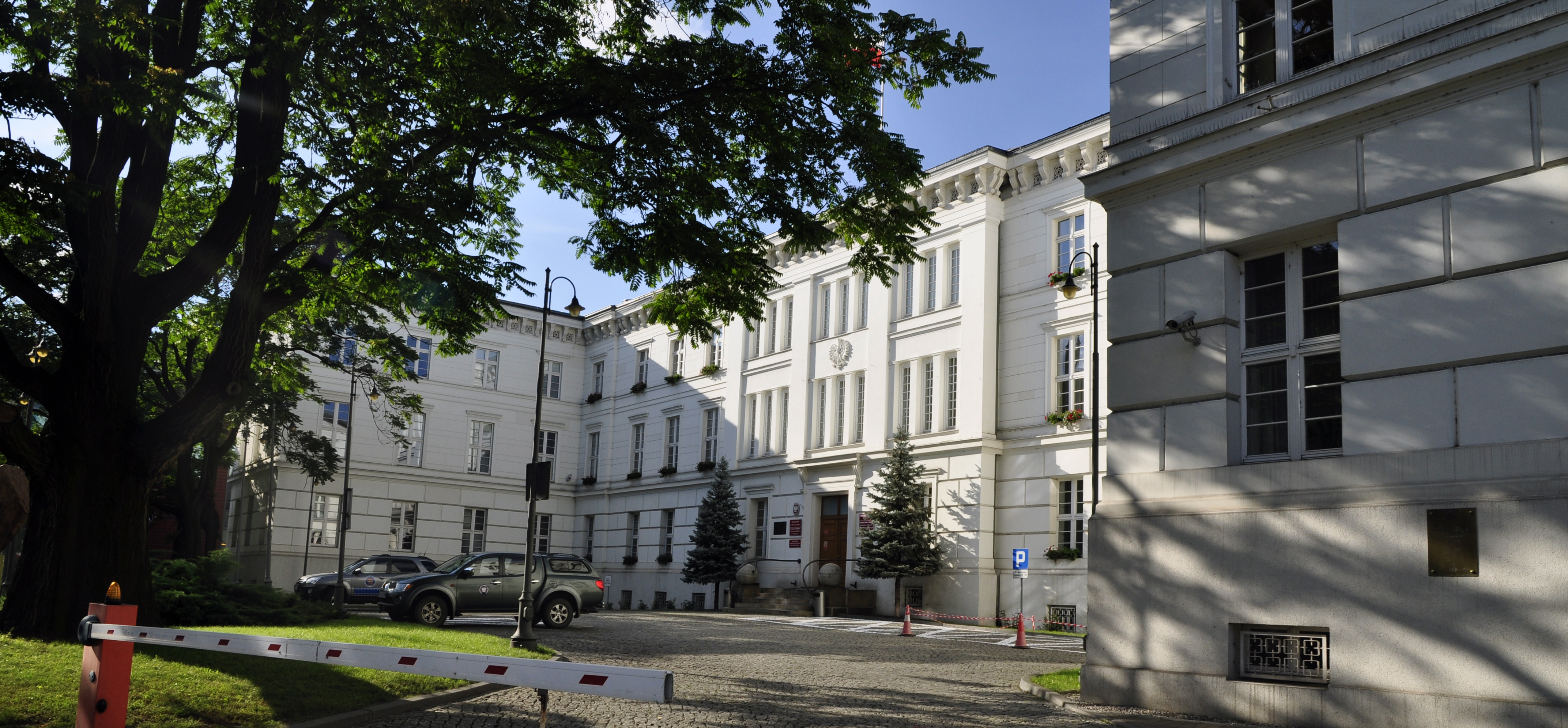 gmach Regencji, ob. Urząd Wojewódzki, 1834-1836, 1863-1864, 1898-1900 (dec. dom)